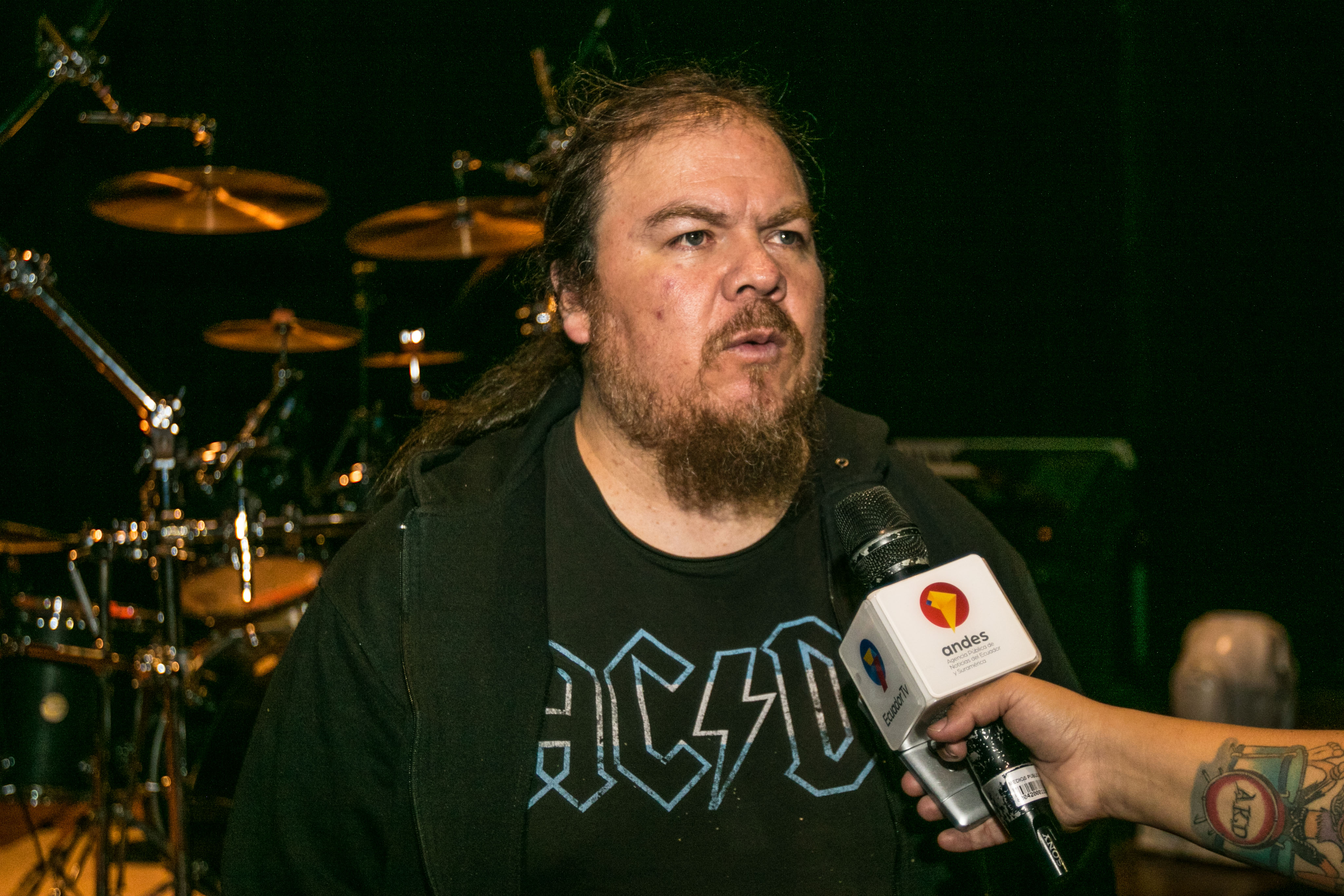 Diego Brito en el evento de Rock en Vivo, en el Teatro México de Quito, Ecuador, en 2018, mientras es entrevistado por el medio de comunicación Andes.